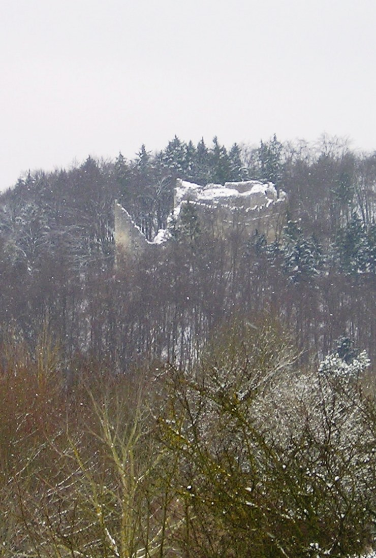 Burgruine_Rumburg_im_Winter,_Gesamtansicht